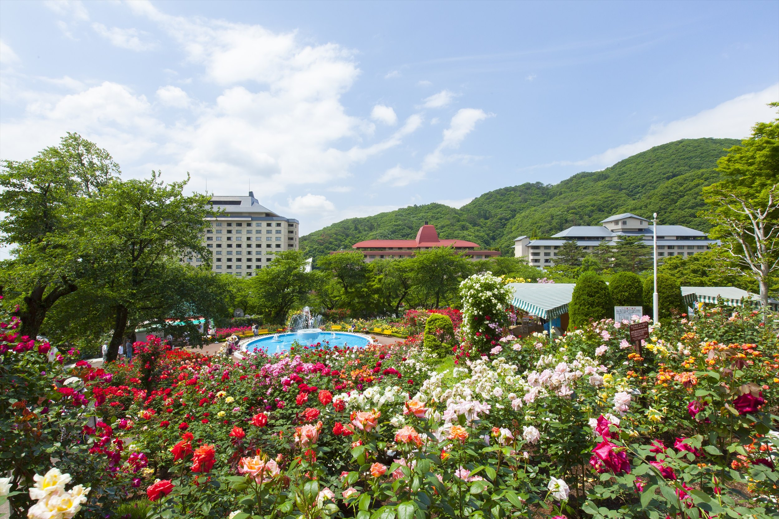 バラ園とホテル3館